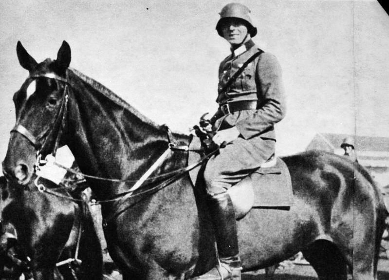 Note: This description has been identified as biased or incorrect: GDR-POV interpretation of intentions. Zentralbild / Quick 16.7.1964 Zum 20. Jahrestag des 20. Juli 1944. Der Gestapo-Spitzel Lübke und der Goebbels-Journalist Lemmer, der im "Pester-Lloyd" die Hinrichtung Stauffenbergs und seiner Gruppe begrüßte, wollen jetzt die Opfer des 20. Juli 1944 "würdigen" und als Vorbilder für ihre Revanche-Politik benutzen. 37jährig, als Oberst und Stabschef des Ersatzheeres wurde Stauffenberg hingerichtet, weil er mit seiner Gruppe einen Ausweg aus der tiefen Krise suchte, die das faschistische Regime seit den katastrophalen Niederlagen der Hitler-Wehrmacht an der deutsch-sowjetischen Front erfaßt hatte. Unser Bild zeigt Stauffenberg beim 17. Reiterregiment in Bamberg. [Claus Schenk Graf von Stauffenberg mit Stahlhelm auf Pferd des 17. Reiterregiments in Bamberg]